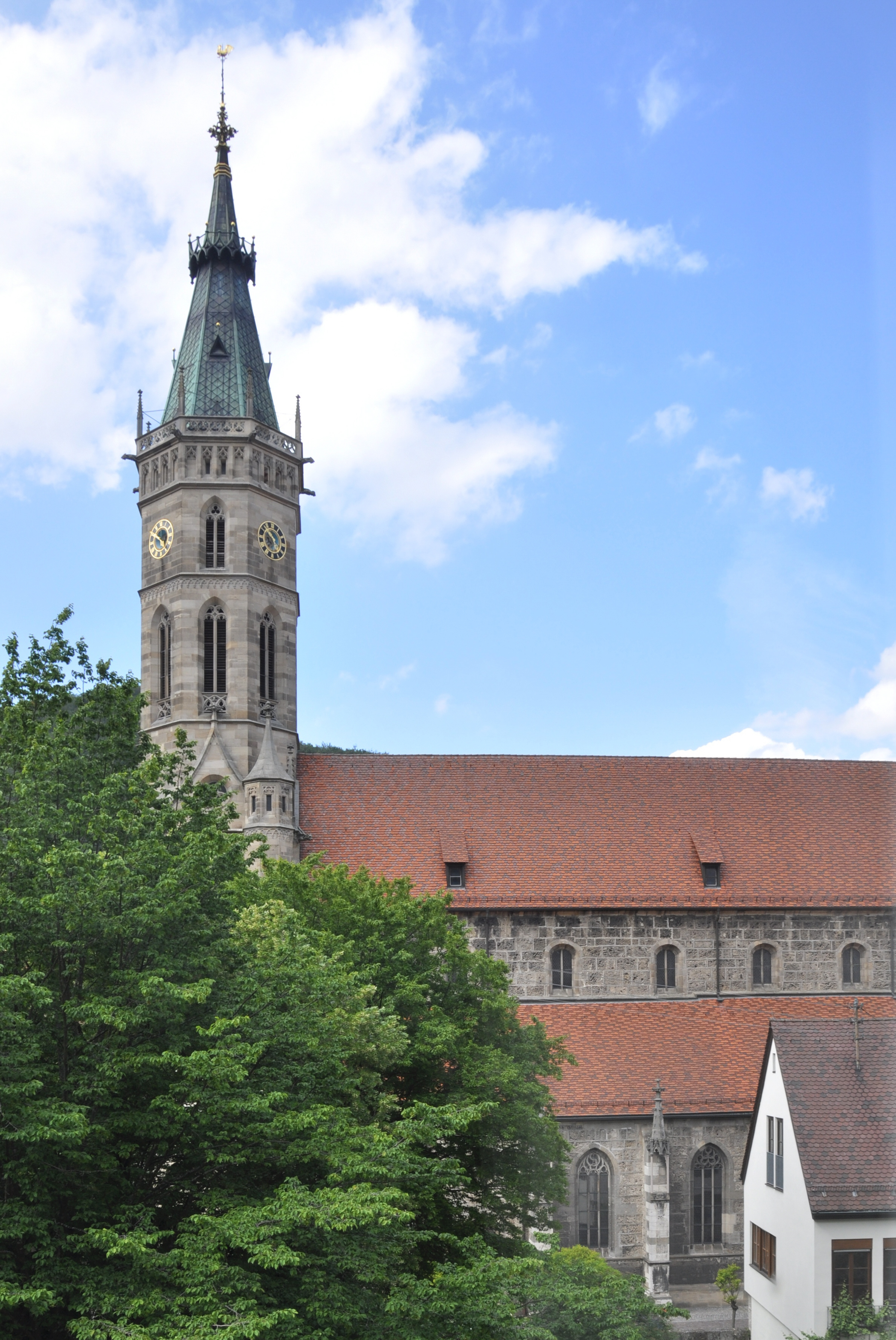 Bad Urach, Stiftskirche St. Amandus